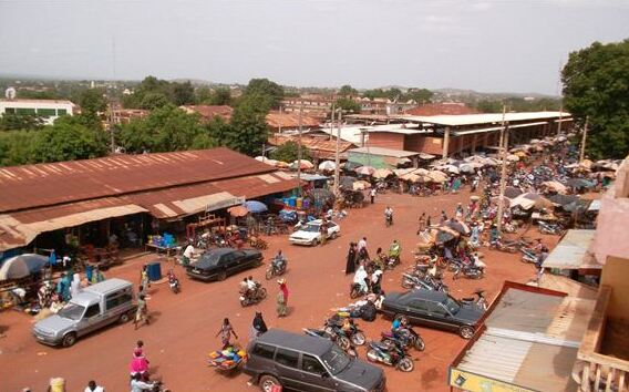 Le grand marche de Sikasso